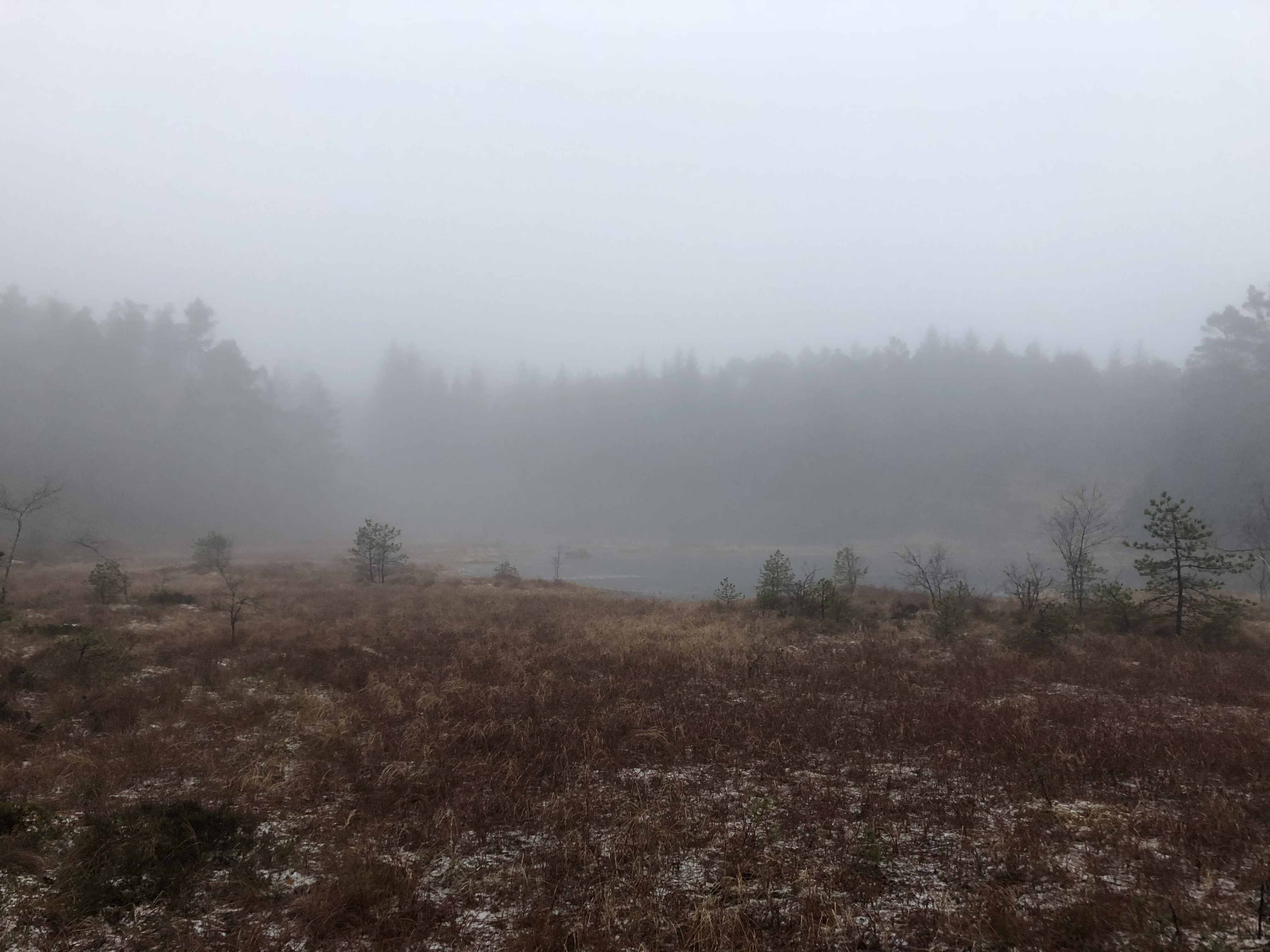 Langatjørna